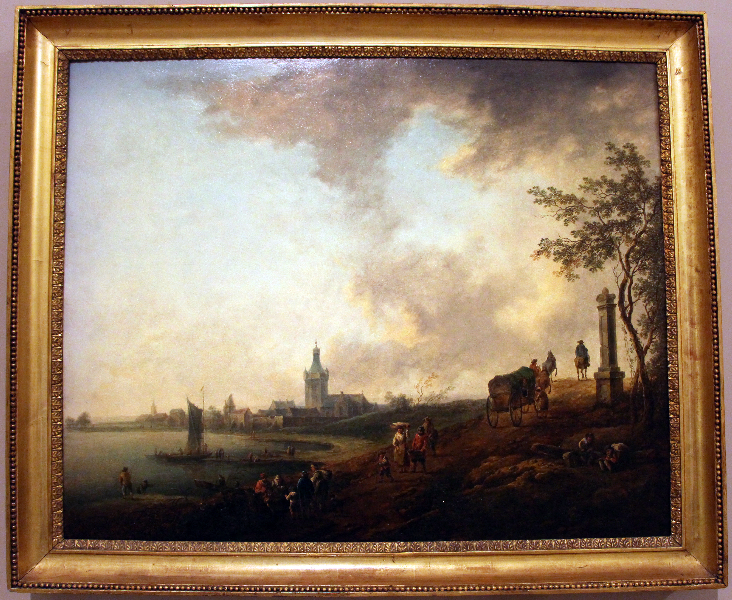 Museo Poldi Pezzoli (Milano)